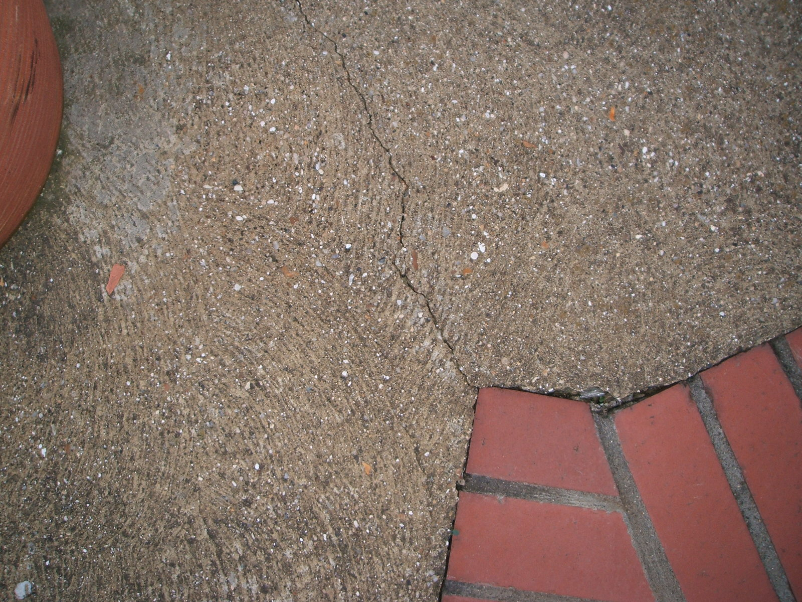 Stress concentrator